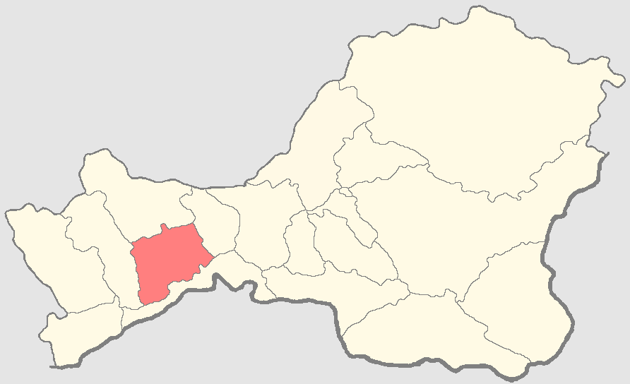 Дзун-Хемчикский кожуун на карте Тывы